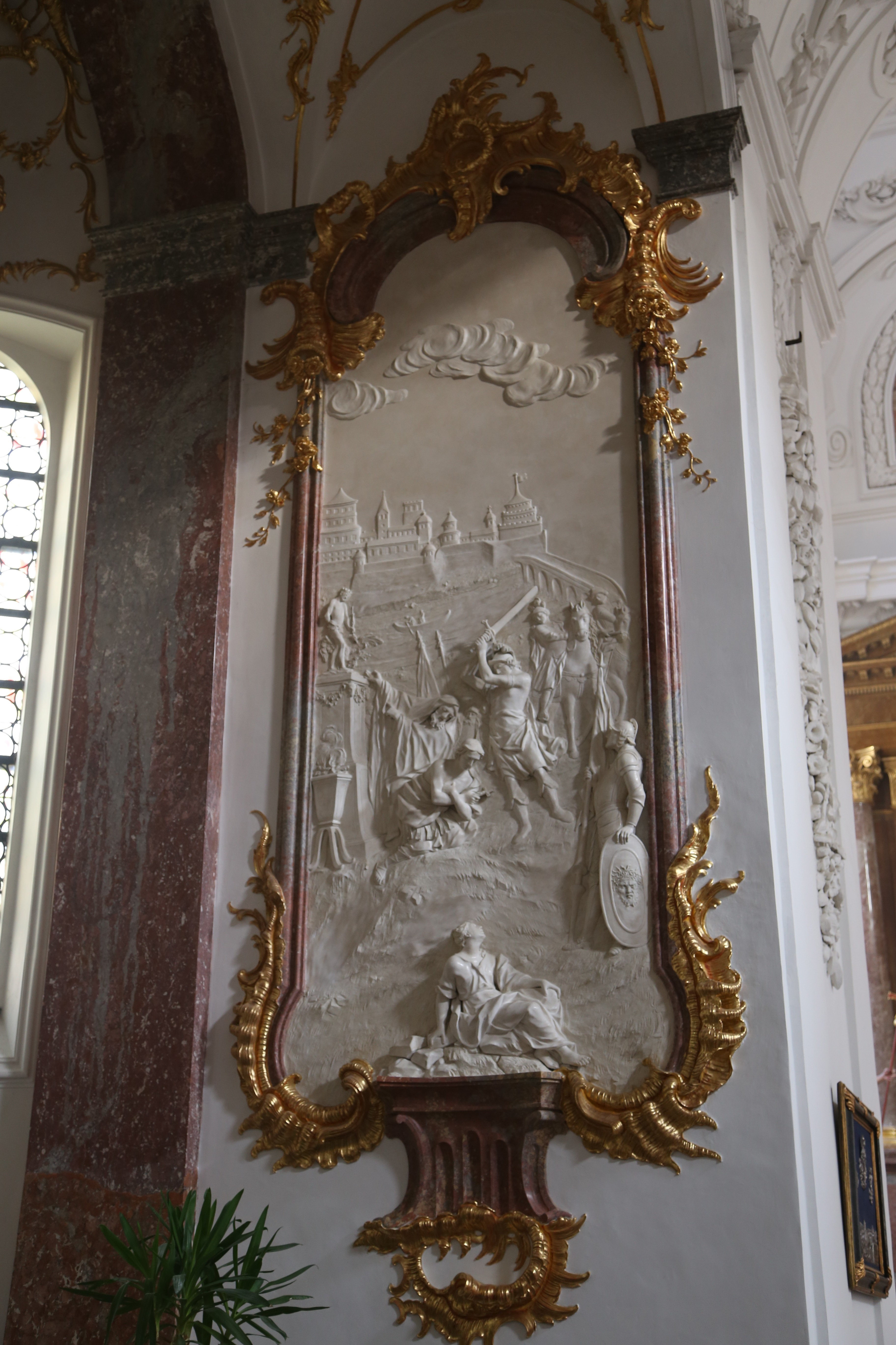 Schloßplatz 2, Tegernsee;Ehemalige Klosterkirche St. Quirin, jetzt katholische Pfarrkirche, dreischiffige Pfeilerbasilika mit Querhaus, Seitenkapellen, mittelschiffbreitem langen Chor und westlicher Doppelturmfassade, Türme und Krypta im Kern 11. Jahrhundert, Psallierchor und dreischiffiges Langhaus 15. Jahrhundert, ab 1678 Barockisierung und Einfügung von Vierung und Querhaus nach Plan von Enrico Zuccalli, um 1820 Abtrennung des östlichen Psallierchores und Umgestaltung der Fassade durch Leo von Klenze; mit Ausstattung